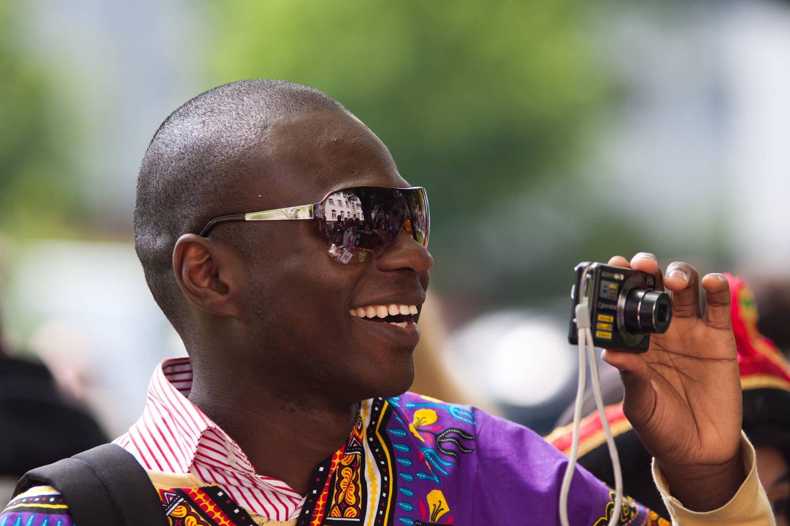 Black man taking a photo at ISWI 2009